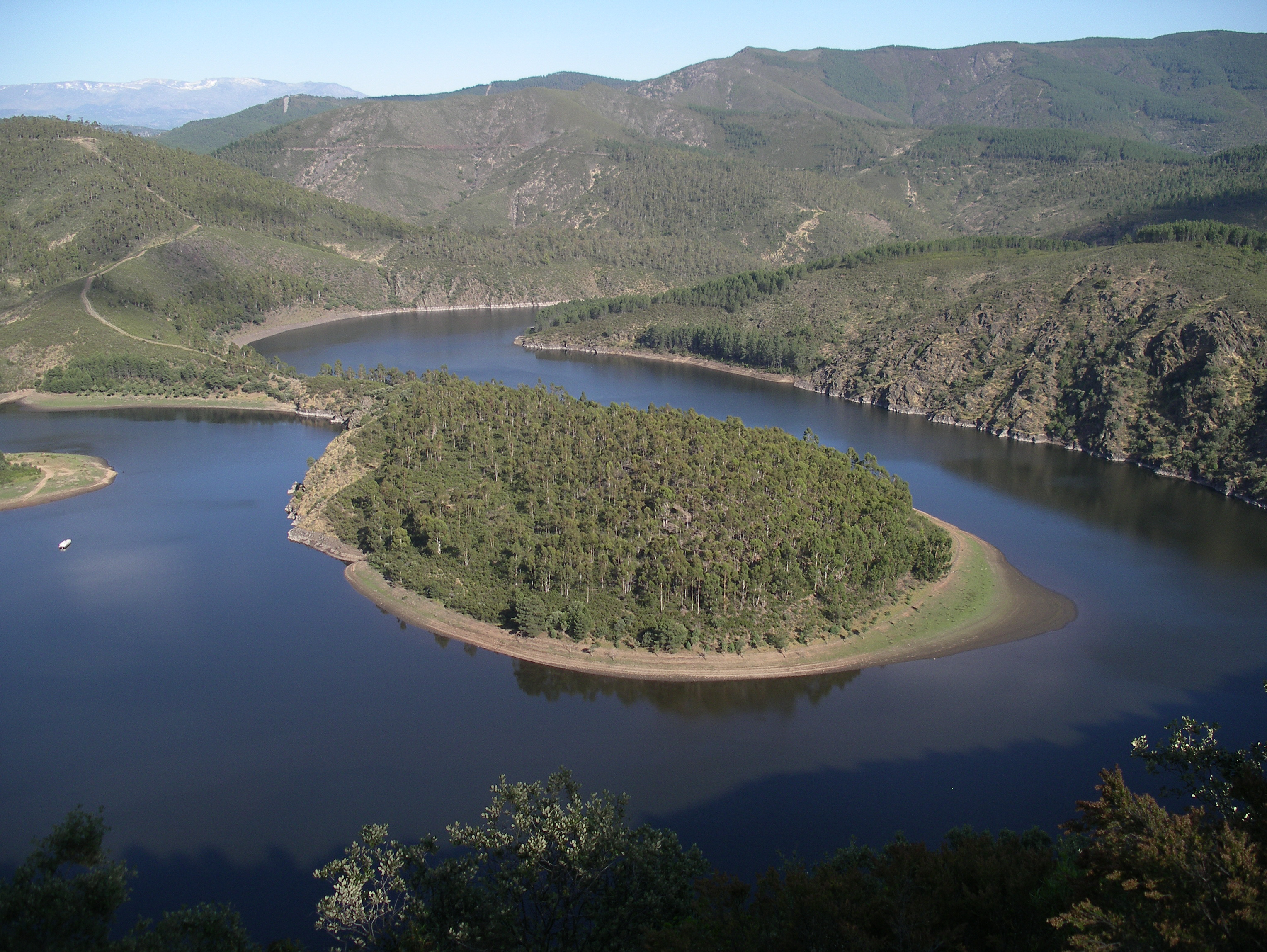 Meandro Melero en el río Alagón. Ríomalo de Abajo. Las Hurdes. Cáceres.